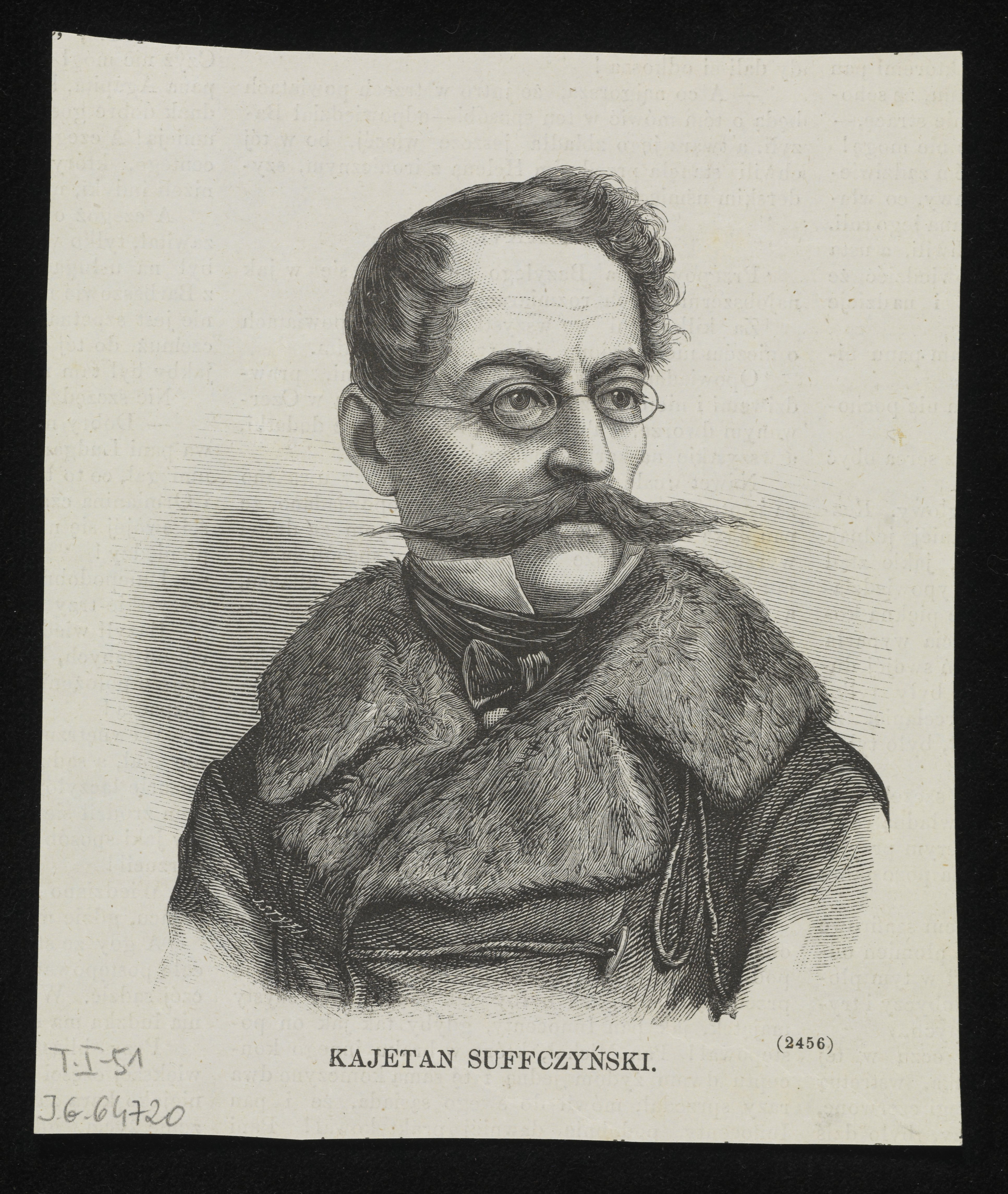 Kajetan Suffczyński